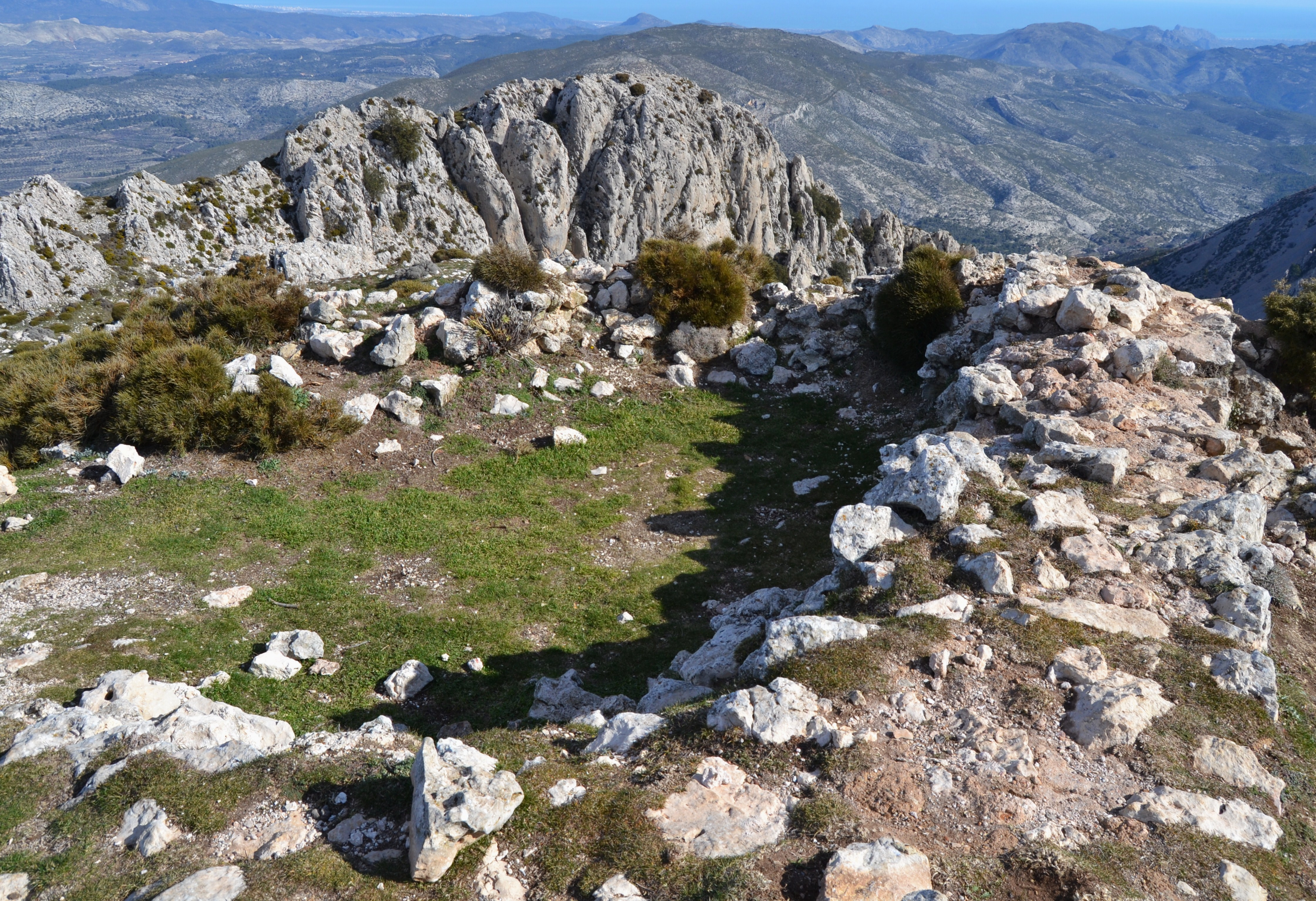 Castell de Xeroles o torre del Pla de la Casa.